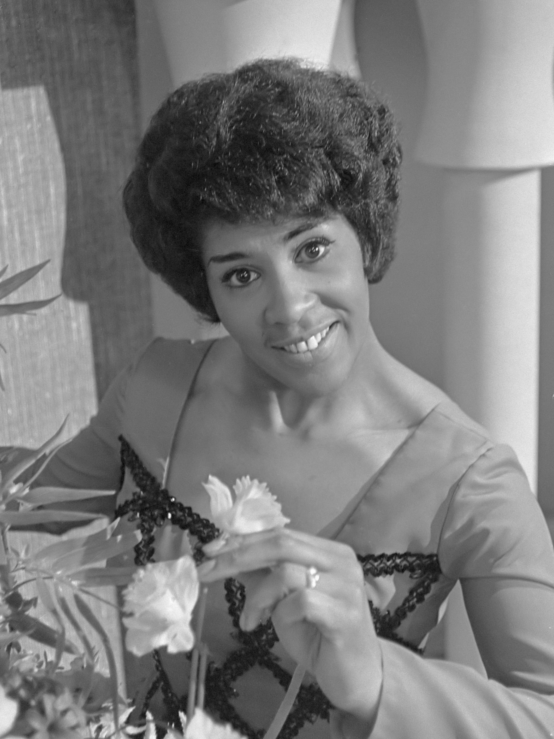 Nationaal Songfestival 1966, Milly Scott laatste kandidate in voorronde 4 februari 1966